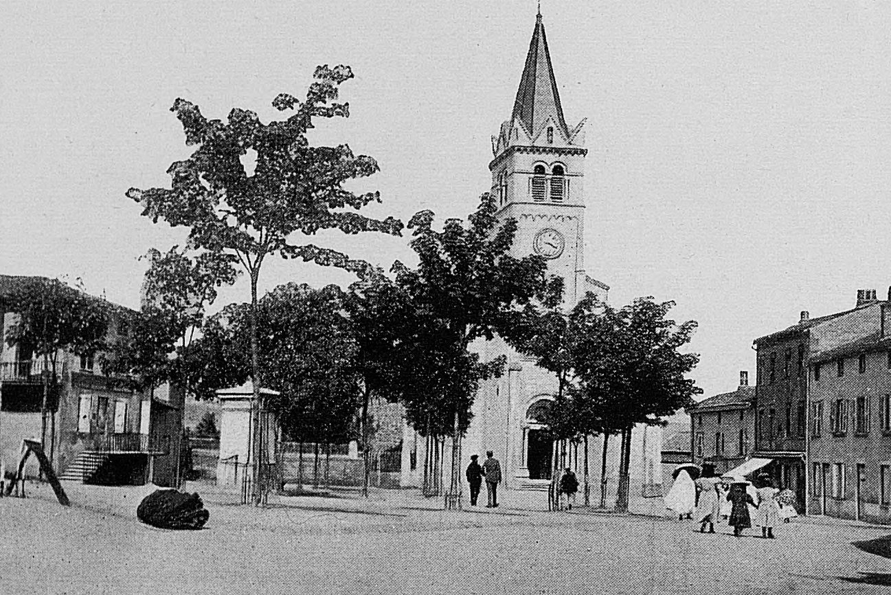 Dictionnaire illustré des communes du département du Rhône. Tome 1 / par MM. E. de Rolland et D. Clouzet.